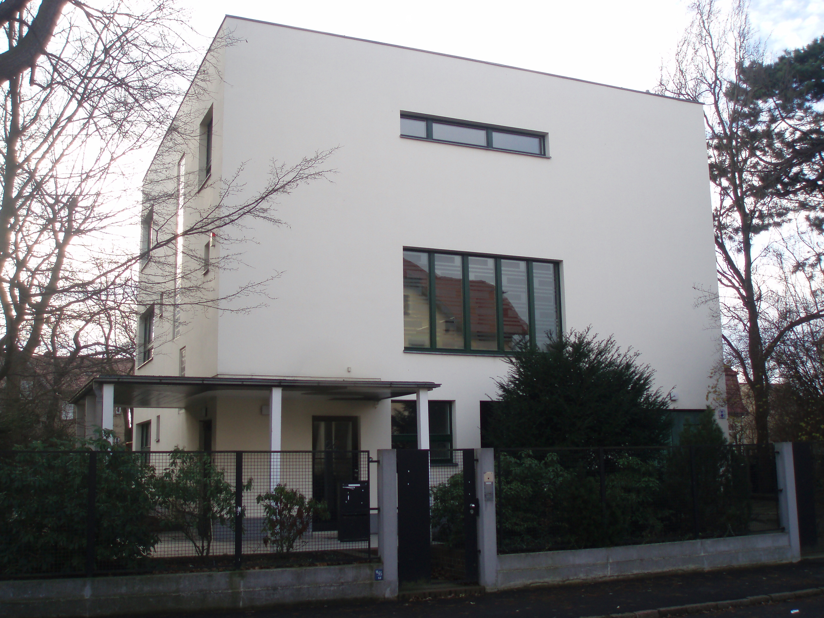 Zwenkau, Haus Rabe im Bauhaus-Stil von 1930, Architekt Adolf Rading